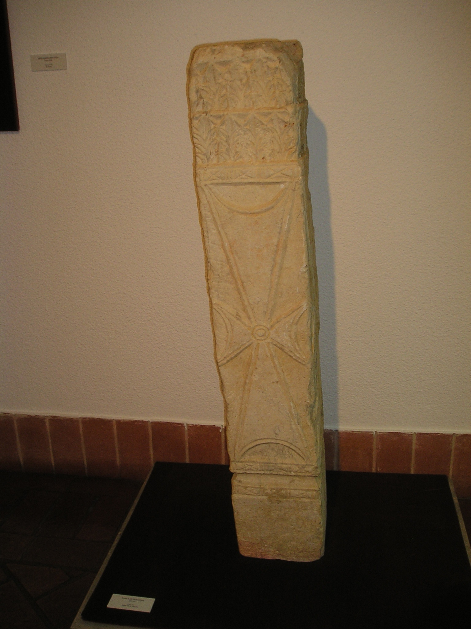 Pilastra visigoda procedente de la Iglesia parroquial de Wamba (Valladolid, España), depositada en el Museo de Valladolid, fundación del rey visigodo Wamba. Esta decorada con una cruz griega estilizada para adaptarse al marco rectangular, y por un capitel de tipo corintio. Fue labrada a mediados del siglo VII